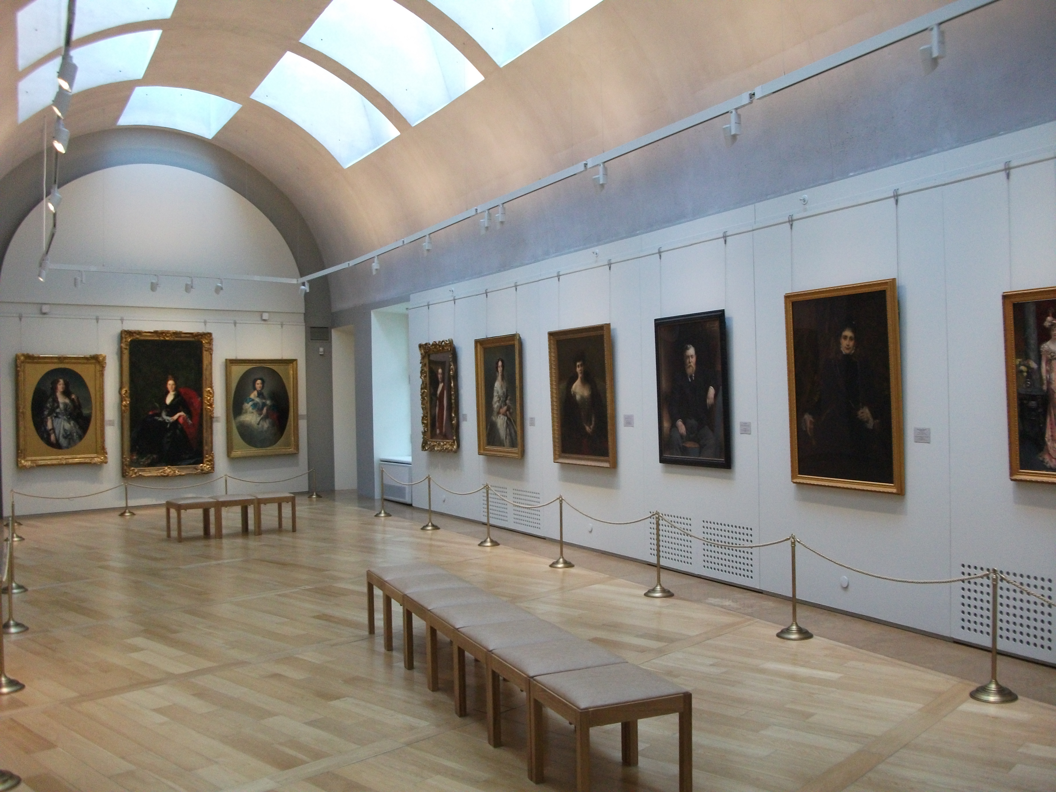 Здание Главного штаба. Зал французской портретной живописи 2-й половины XIX века